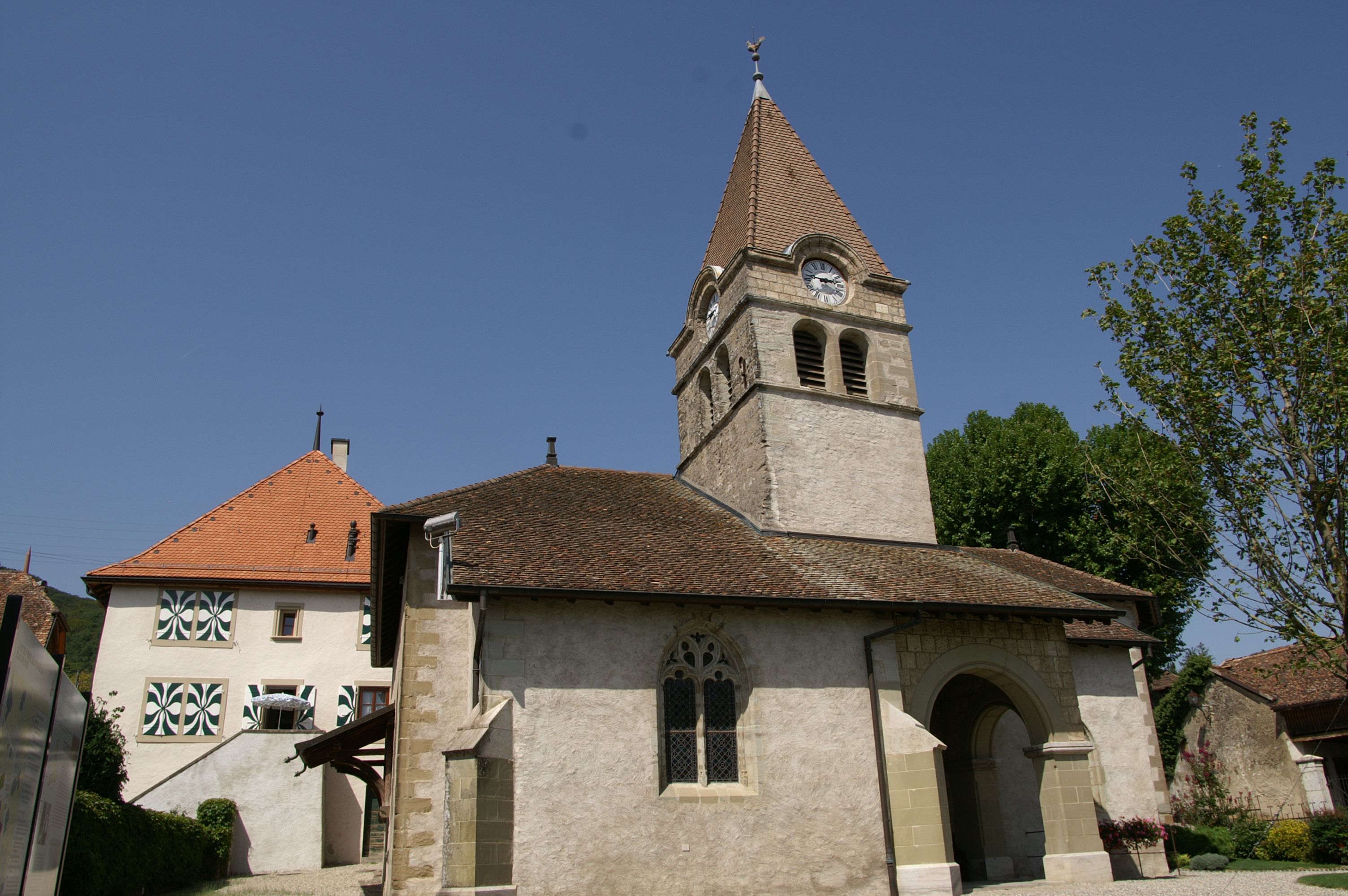 Façade sud de l'église réformée Saint-Martin de Bursins.